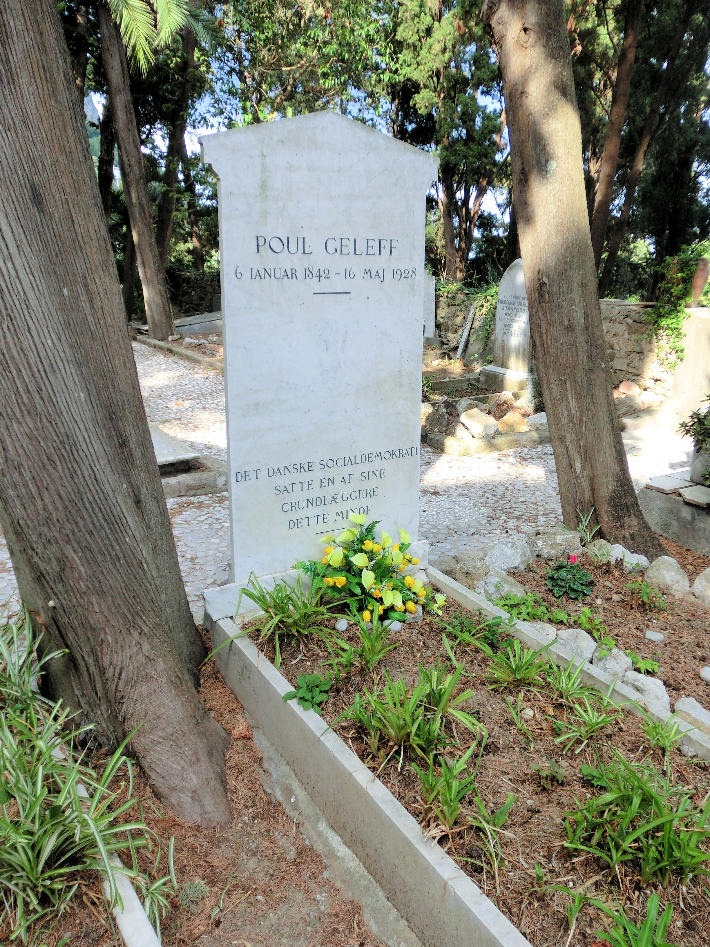 Cemeterio Acattolico Capri, Grave Paul Geleff (1842-1928)